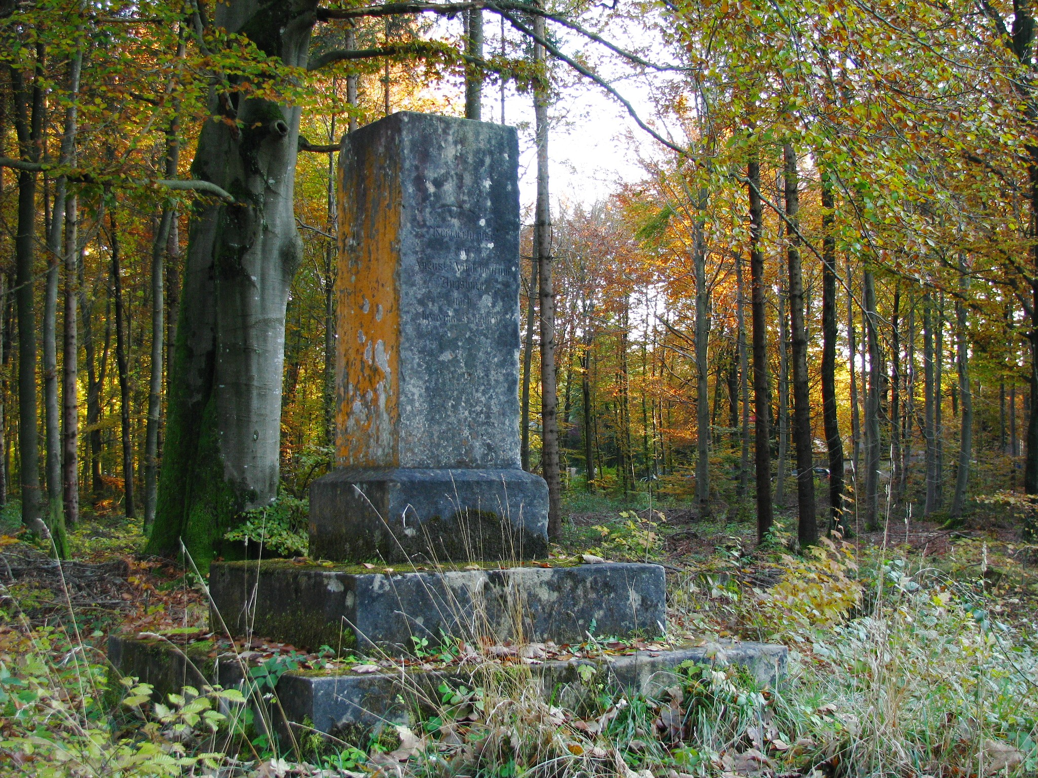 Gedenkstein an der Wolfratshauser Straße (heute Bundesstraße 11) am Rande des Forstenrieder Parks